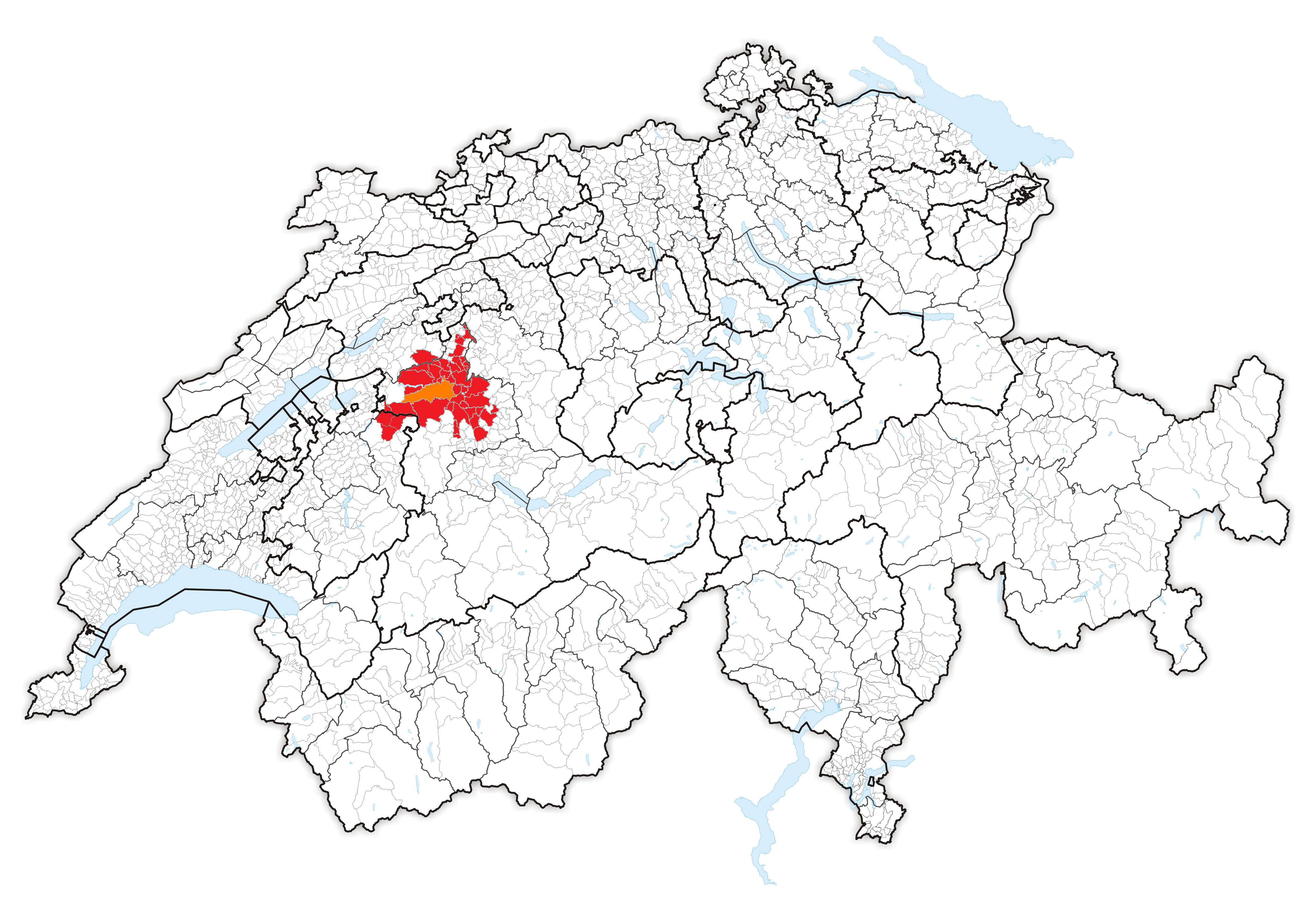 Agglomeration Bern in der Schweiz